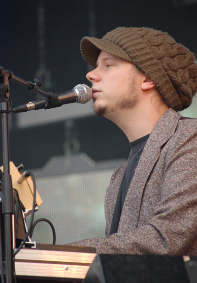 Tuomo Prättälä in Flow Festival in Helsinki